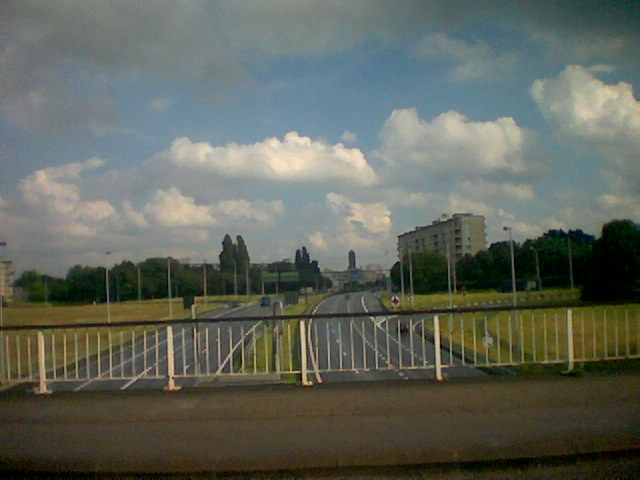 Photo de la A(1)12 depuis la N148